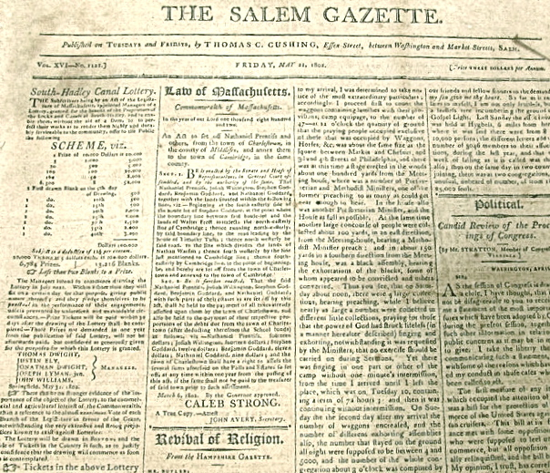 Newspaper, Salem, Massachusetts, USA